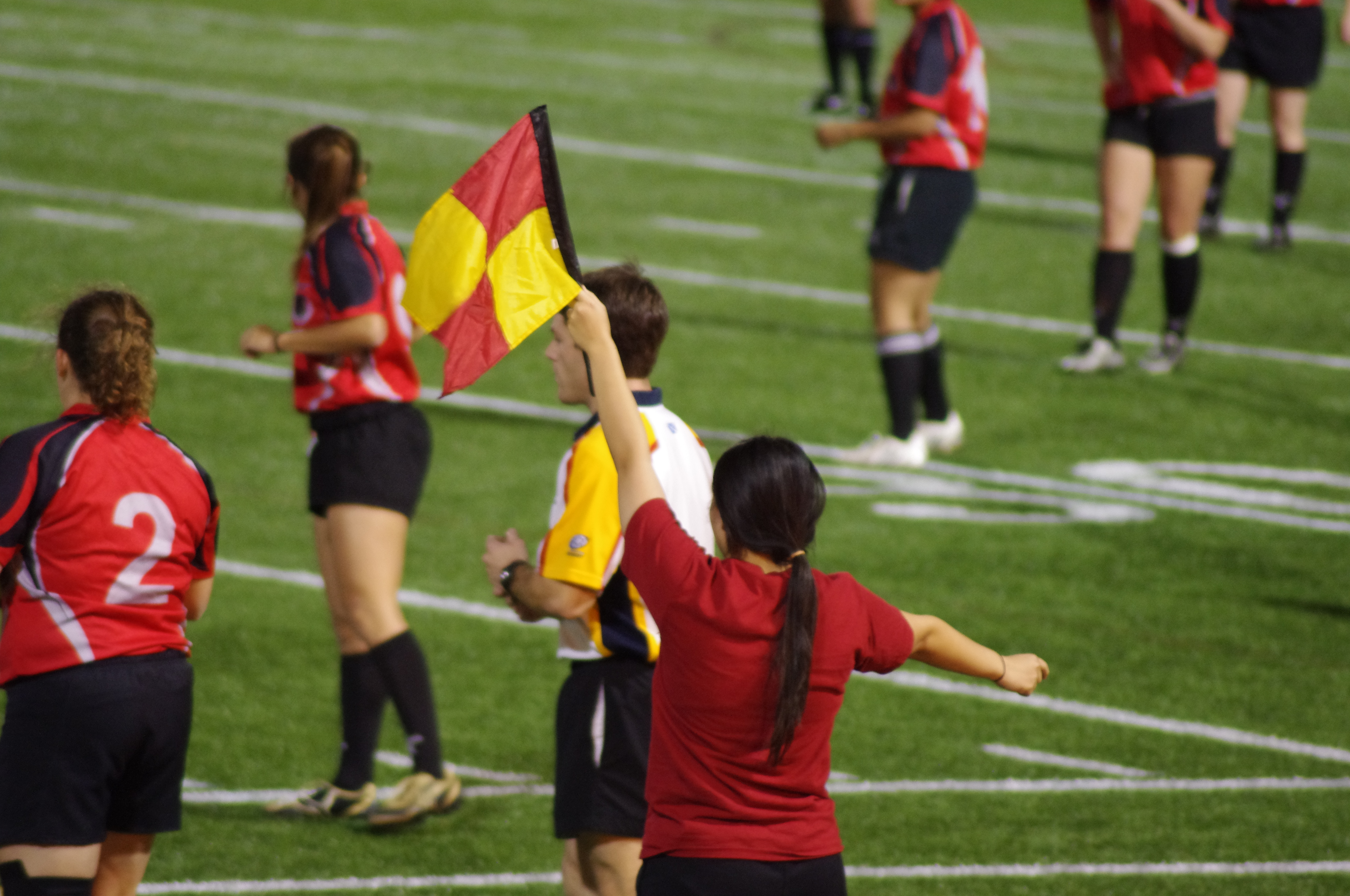 rugby à XV féminin sur le terrain de Roberts. Lancer en touche. L'arbitre, le juge de touche et les lignes arrière.IMGP8010